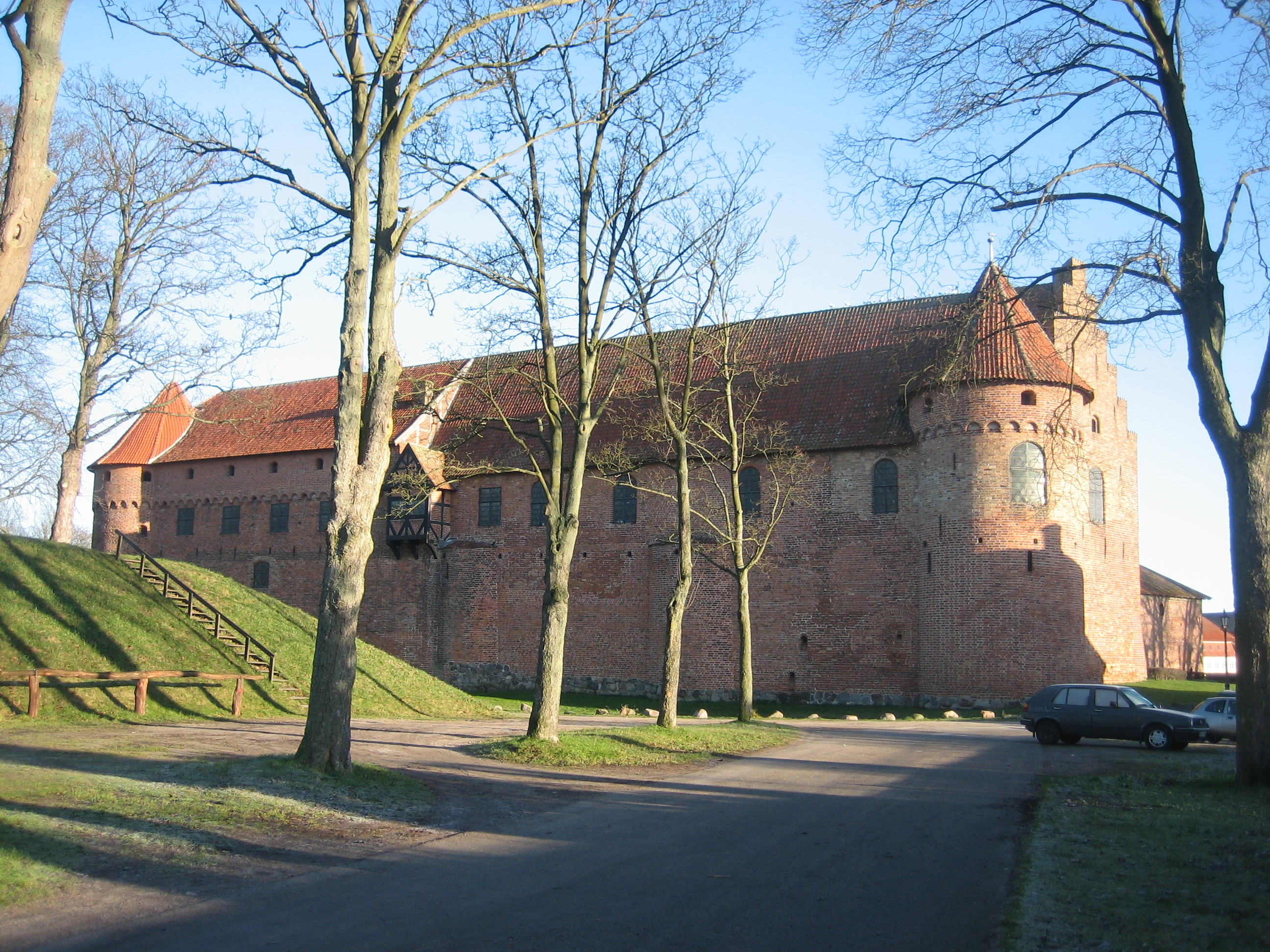 Nyborg Castle, Denmark.